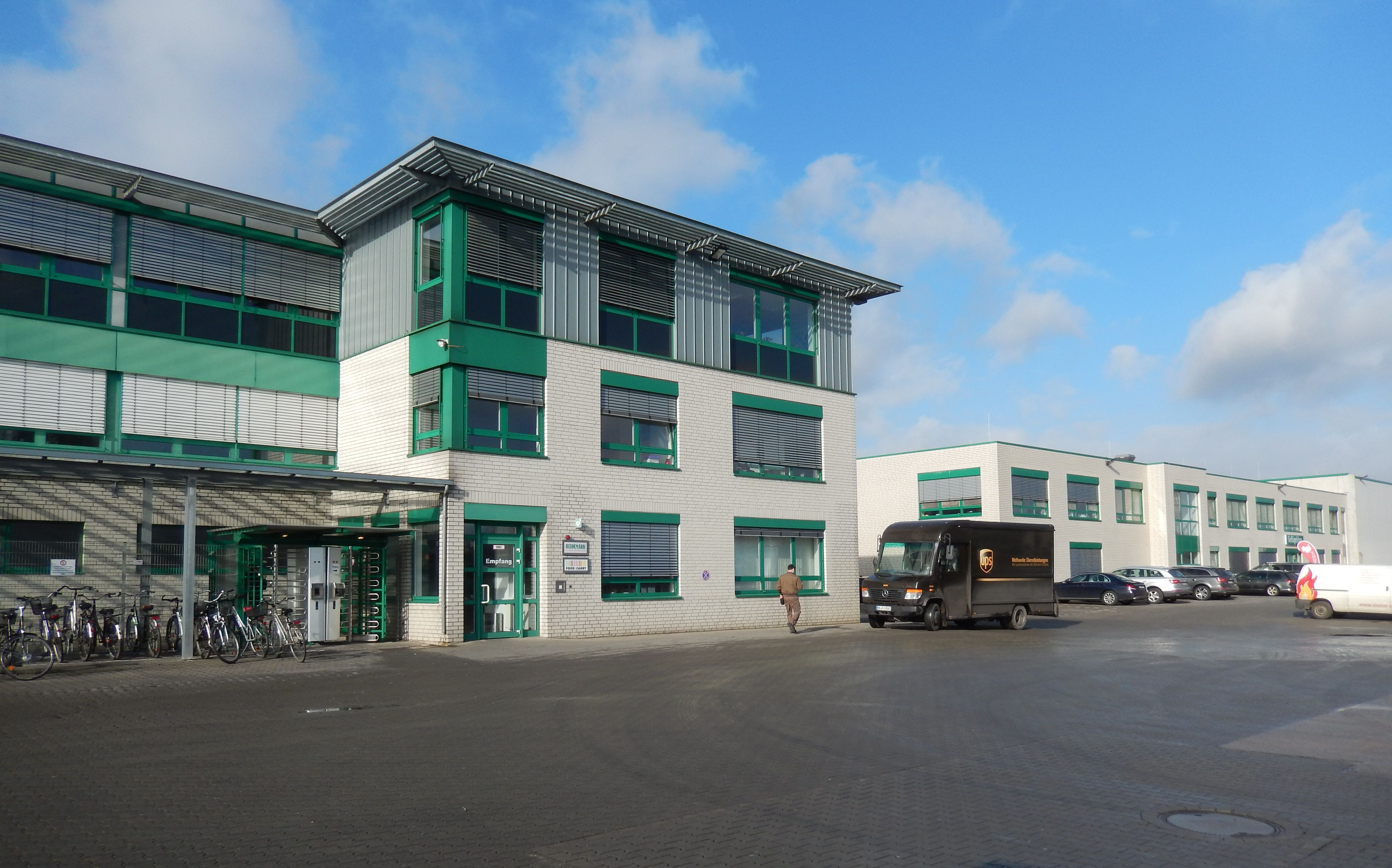 Firma Heidemark in Ahlhorn